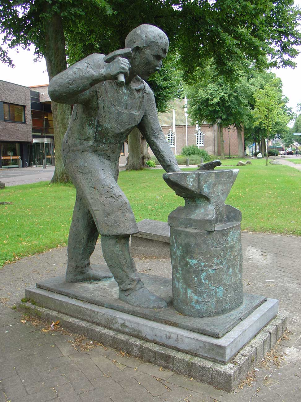 "De smid" standbeeld op de Brink van Gieten, beeldhouwer Bert Kiewiet